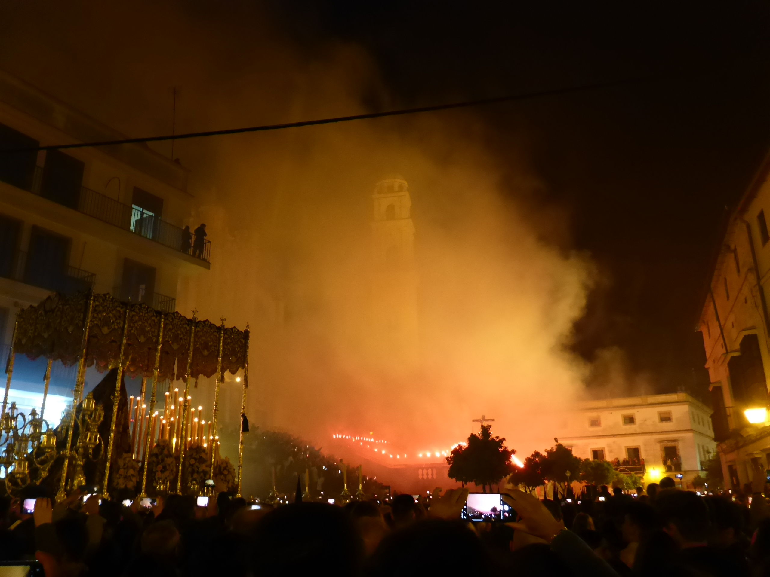 Recogida del Cristo de la Viga entre bengalas (Jerez de la Frontera)